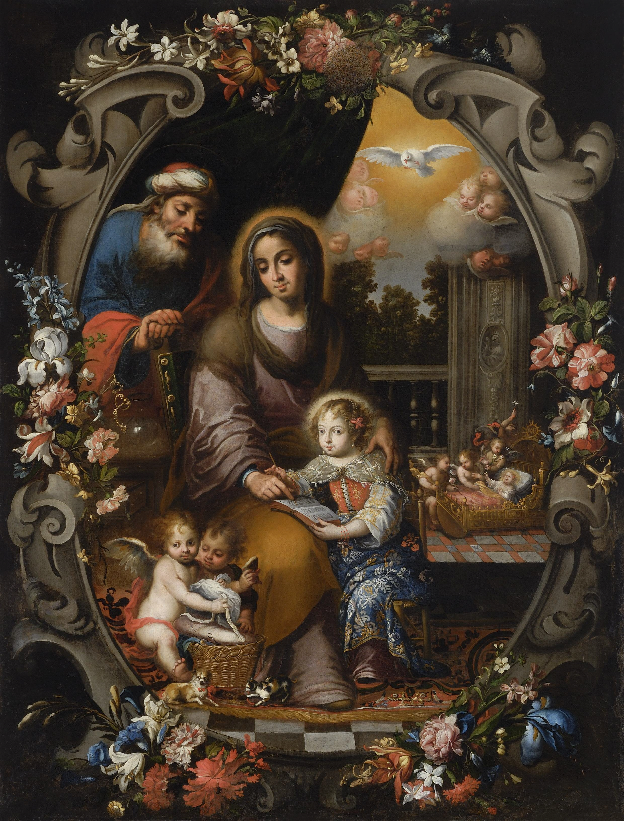 La obra representa a la Virgen María junto a sus padres, San Joaquín y Santa Ana.